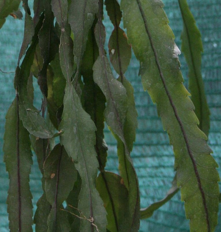 Lepismium houlletianum (Rhipsalideae; Cactaceae; Planta) kaktusz